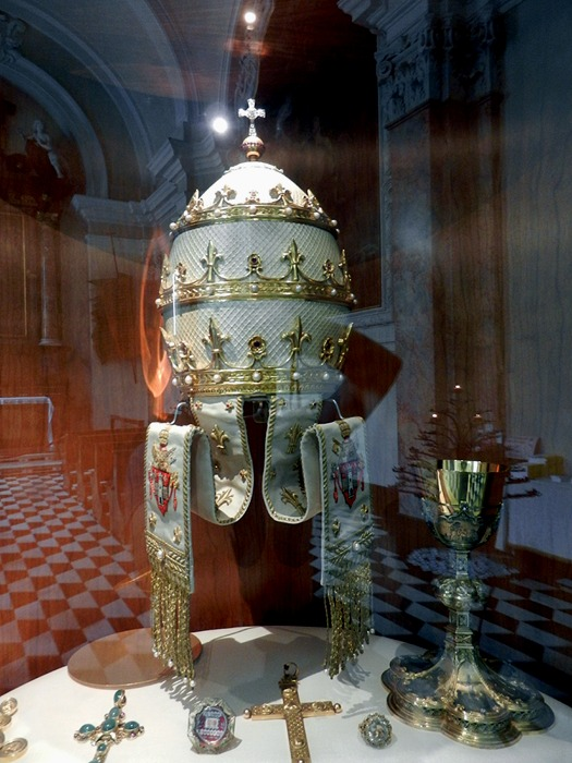 Bergamo - Tiara di papa Giovanni XXIII custodita nella Cappella di S. Vincenzo nel Duomo